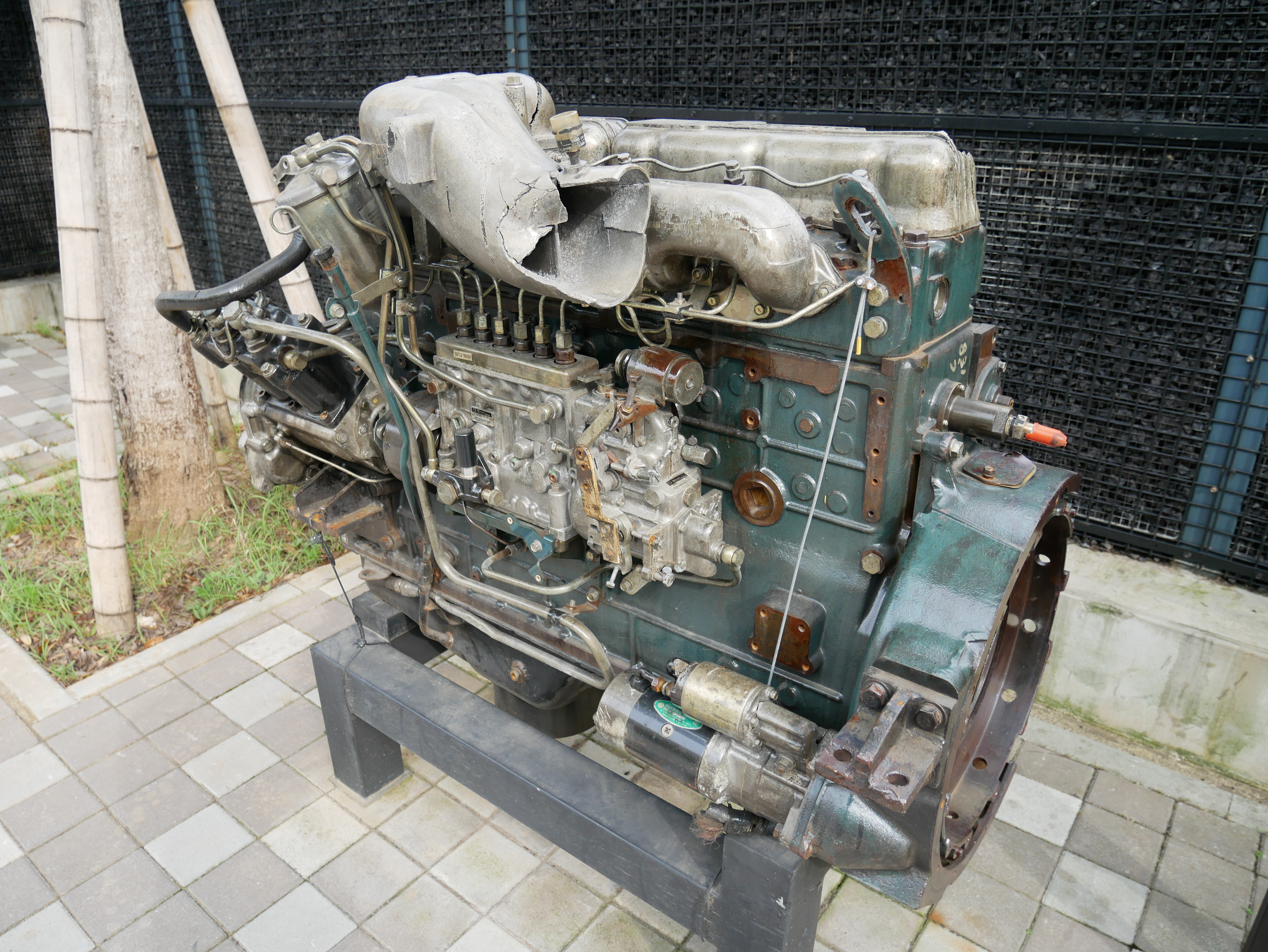 中文（台灣）: 日產PE6柴油引擎，桃園市桃園區市中次分區武陵里